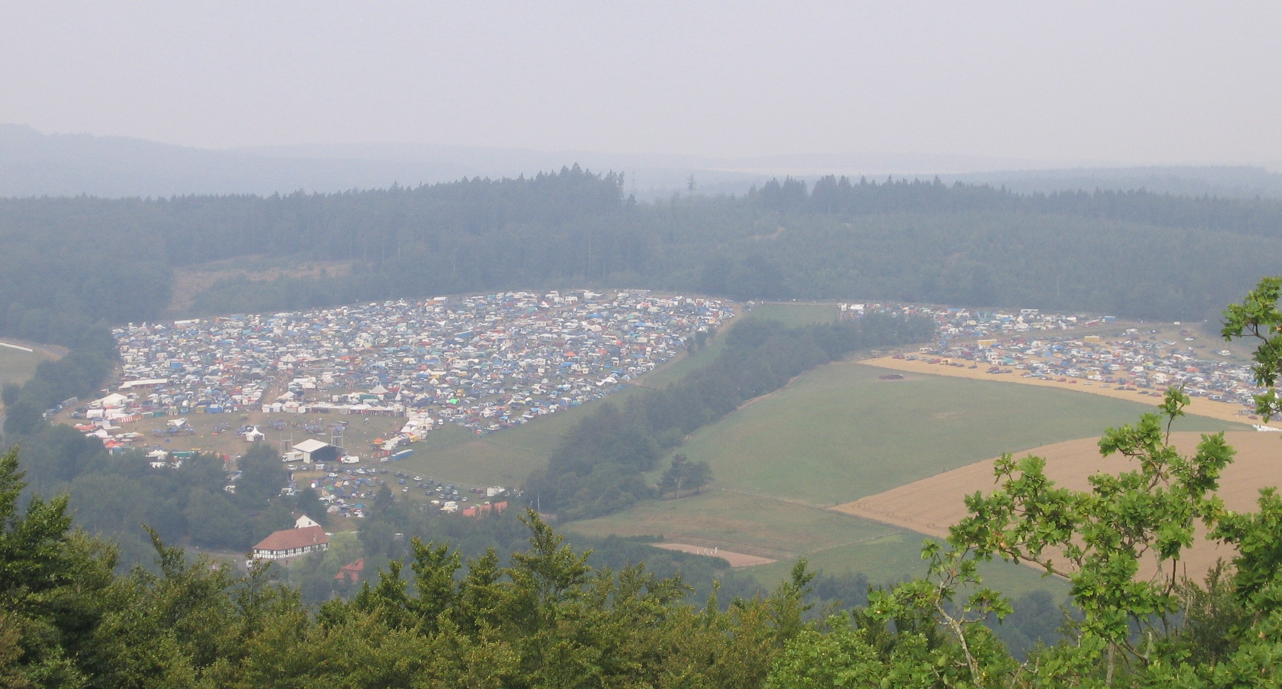 Das Festivalgelände gesehen von der Aussichtsplattform auf der Burg Herzberg